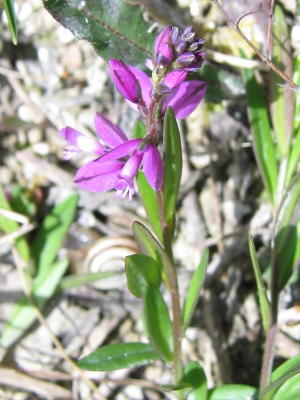 Gewöhnliche Kreuzblume Polygala vulgaris, Rügen